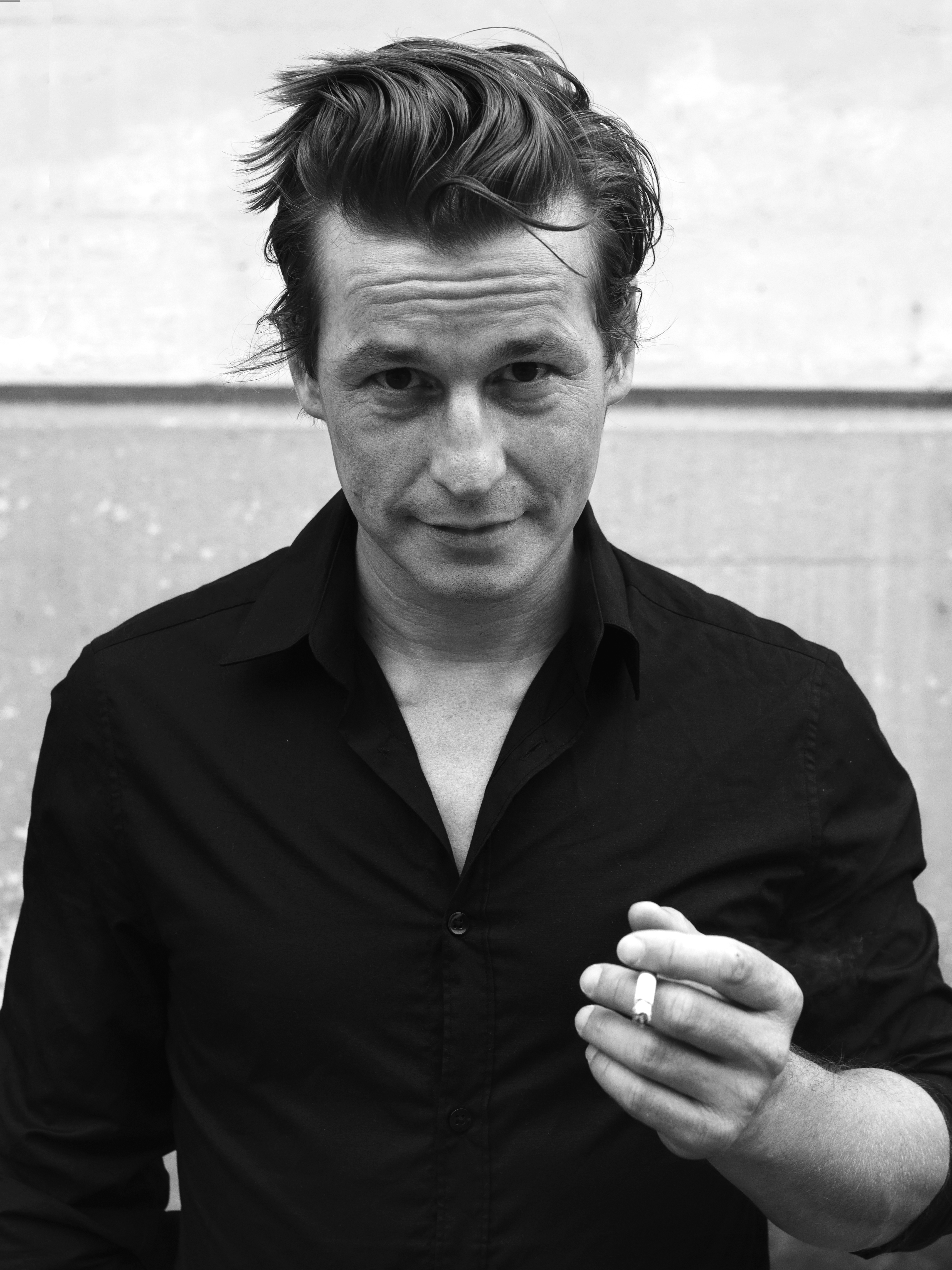 Copyright: Janosch Abel